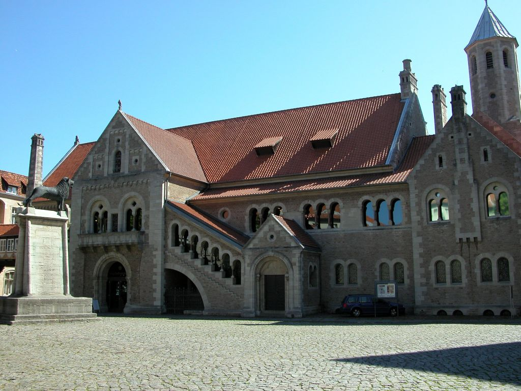 Braunschweig: Burg Dankwarderode mit dem Braunschweiger Löwen